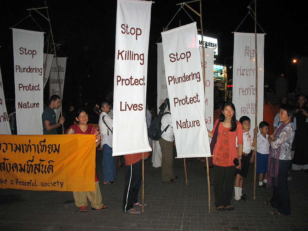 INEB Konferenz 2009 in Chiang Mai, Thailand, Peace Walk zum Abschluss der Tagung.